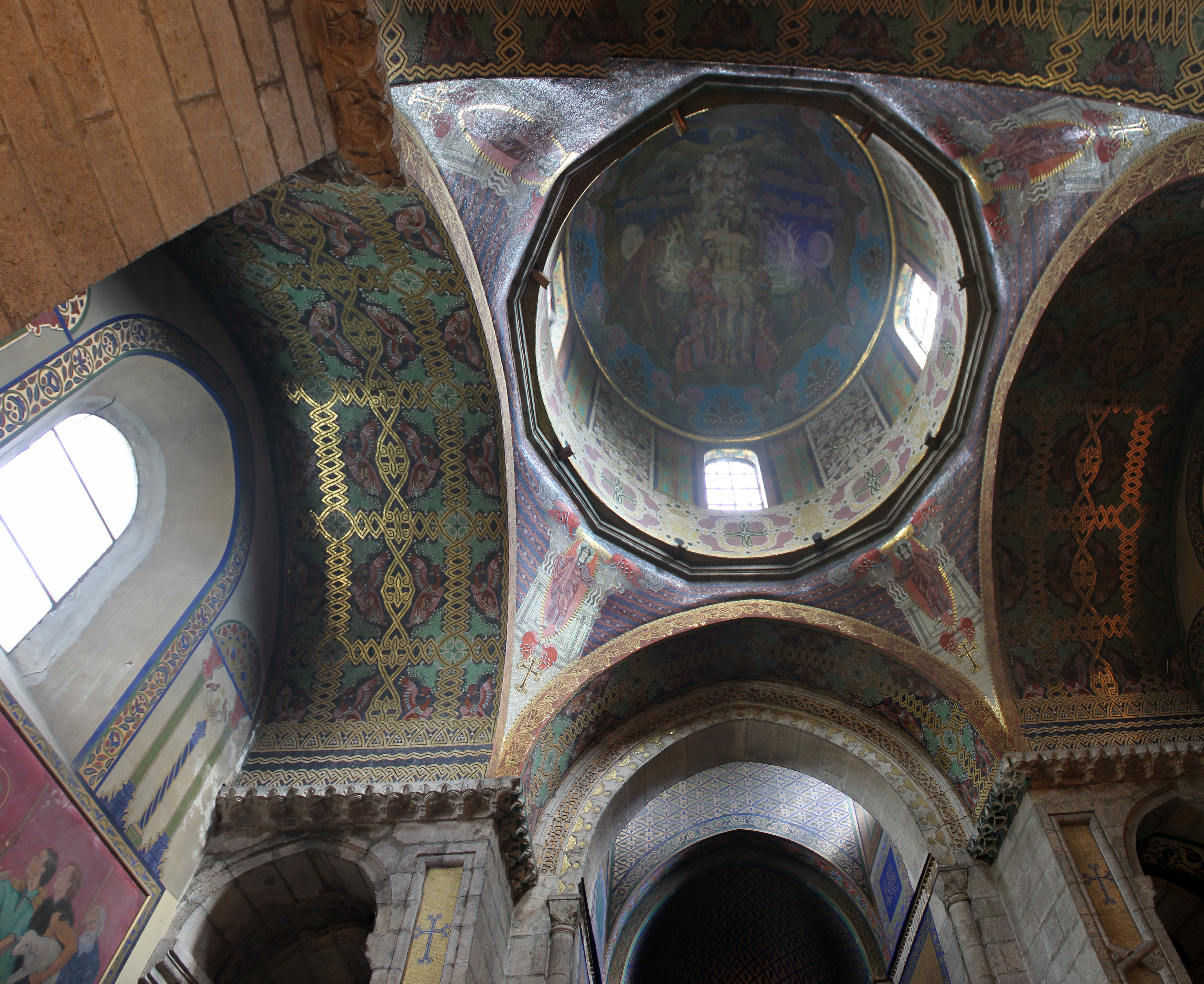 Вірменський собор Св.Трійці, вул. Вірменська,7, м.Львів